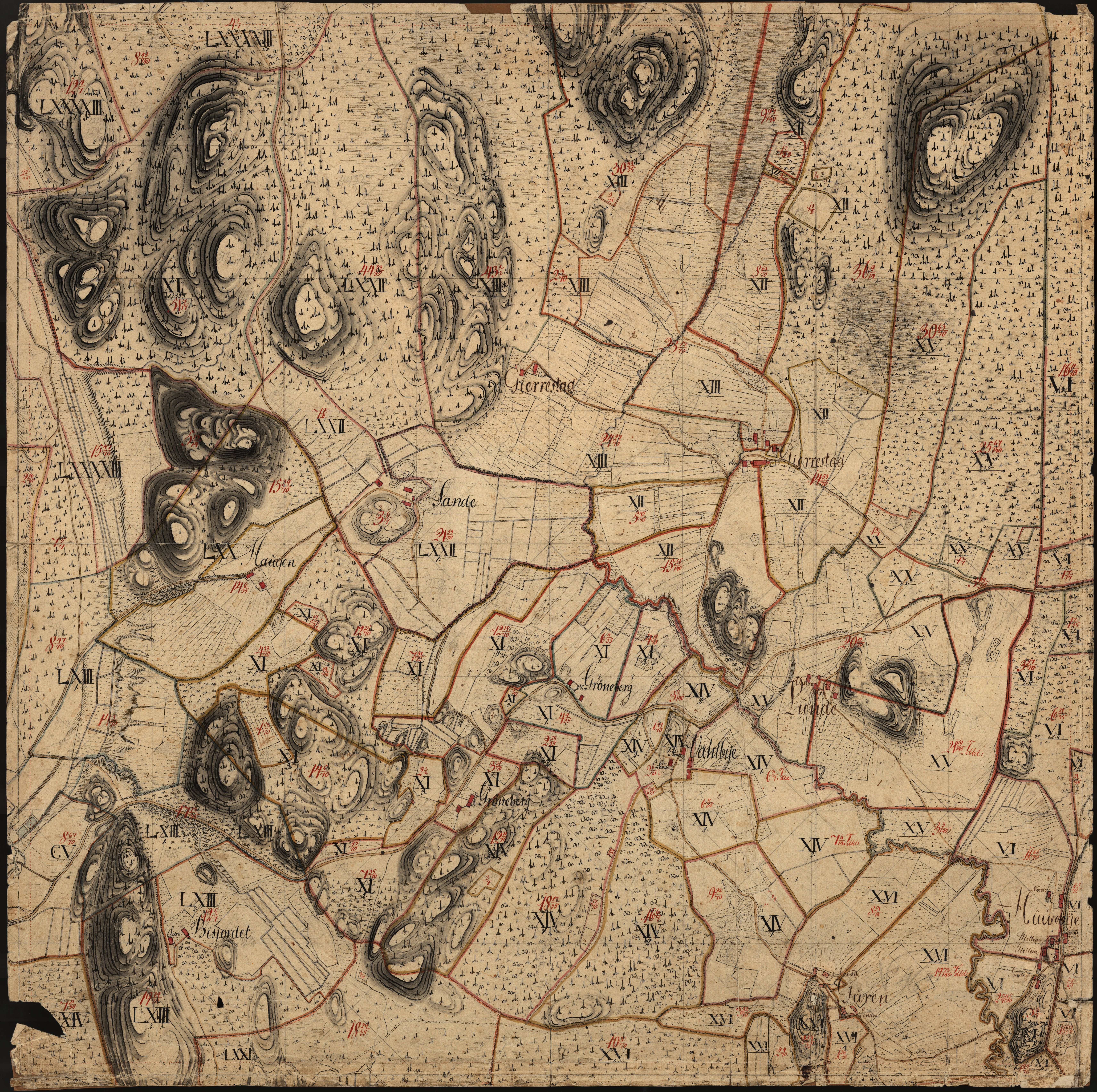 Tjølling, Larvik